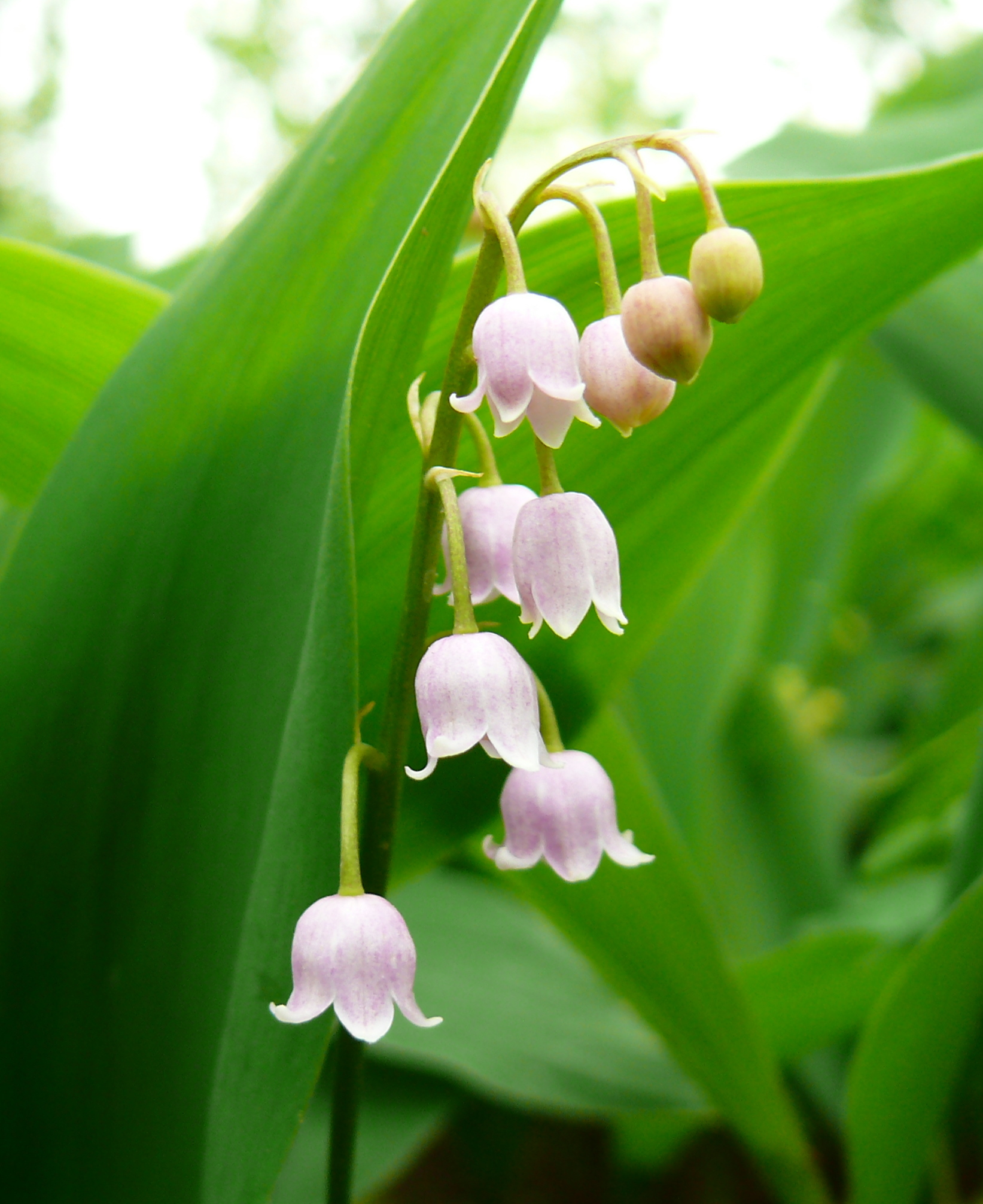 C.m. cv. Rosea